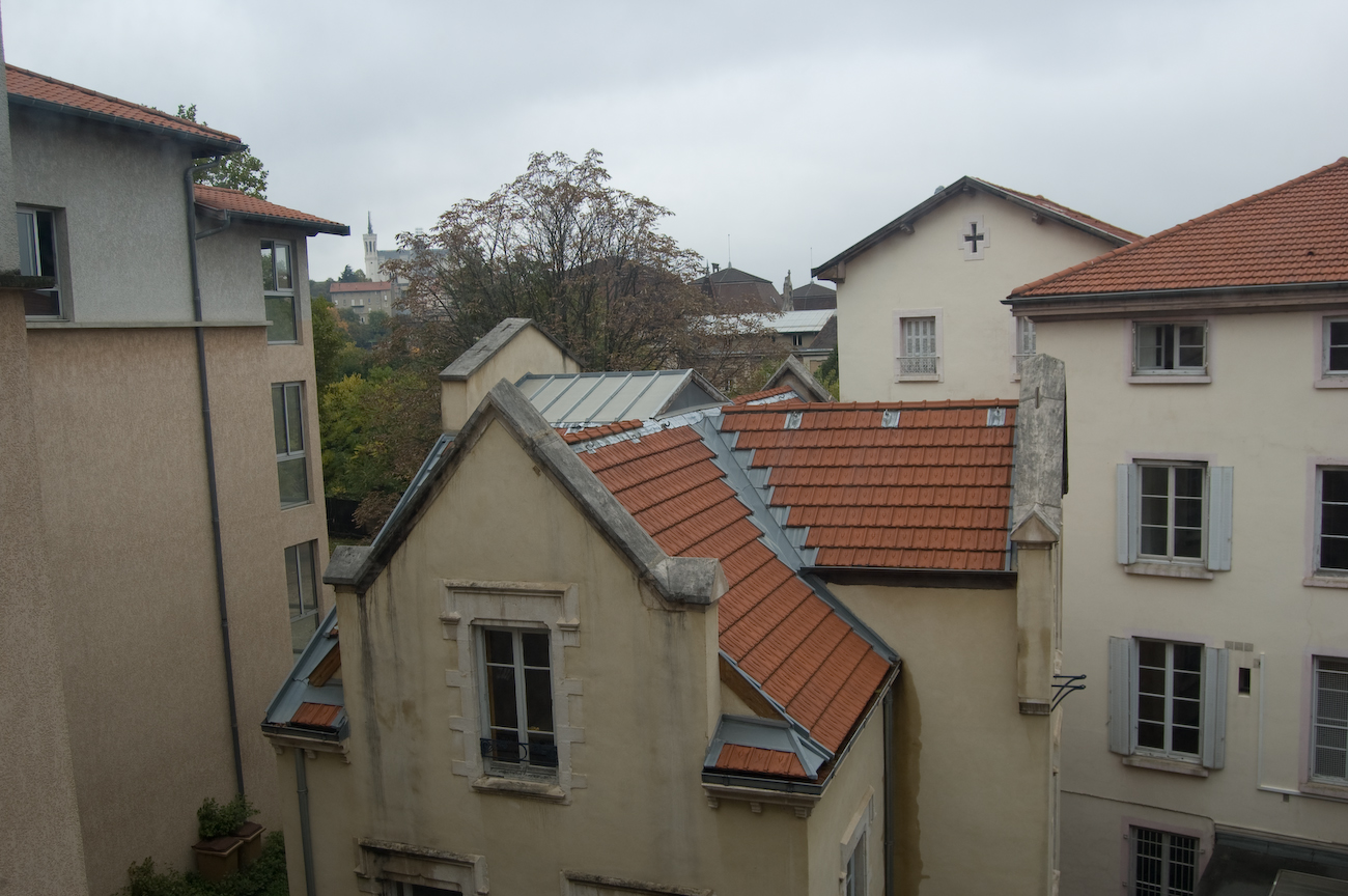 Vue de la prépa depuis le bâtiment principal.